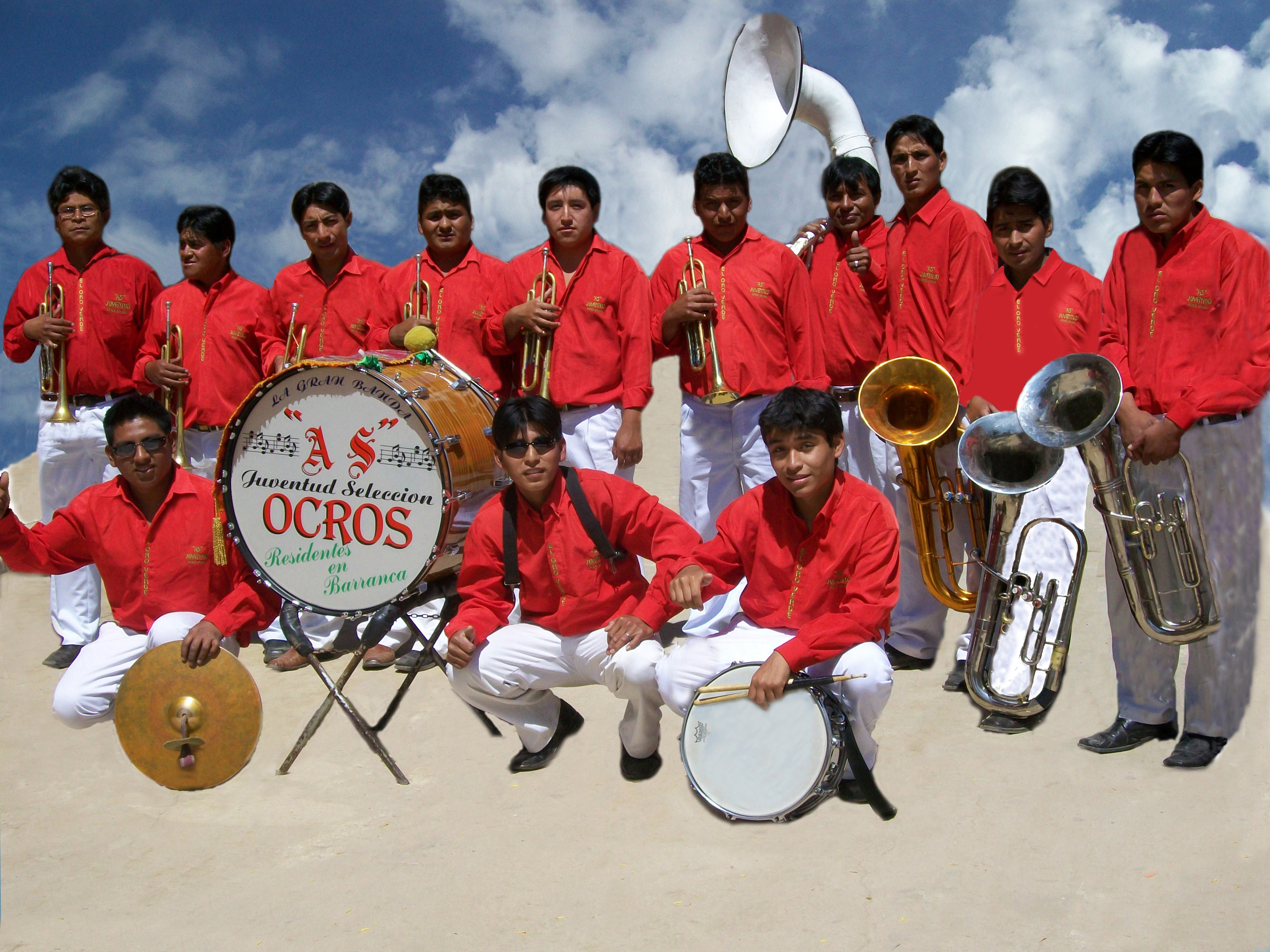 Banda AS Ocros.Ancash